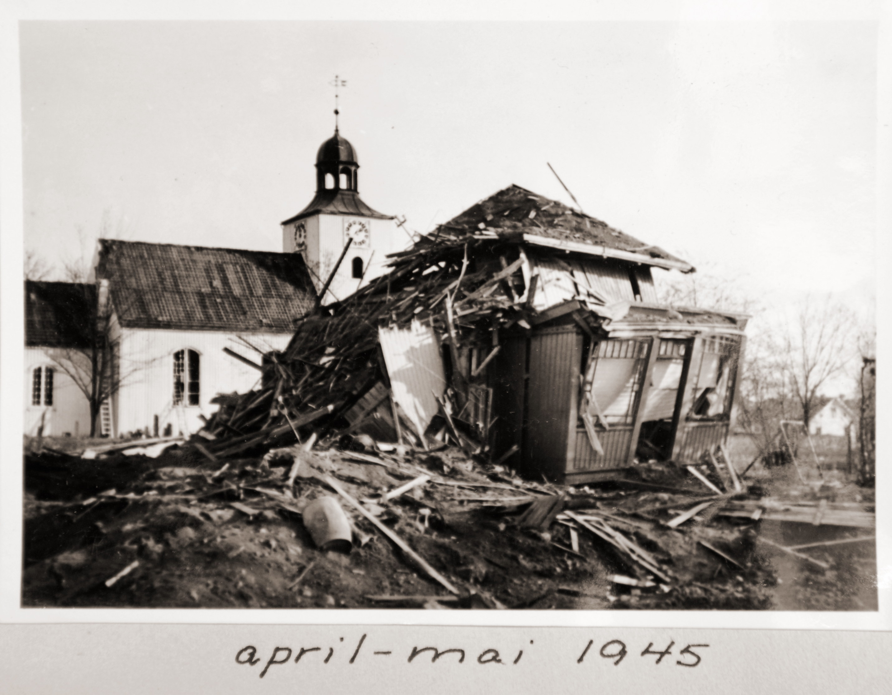 Angrepet på Vallø, før- og etterbilder